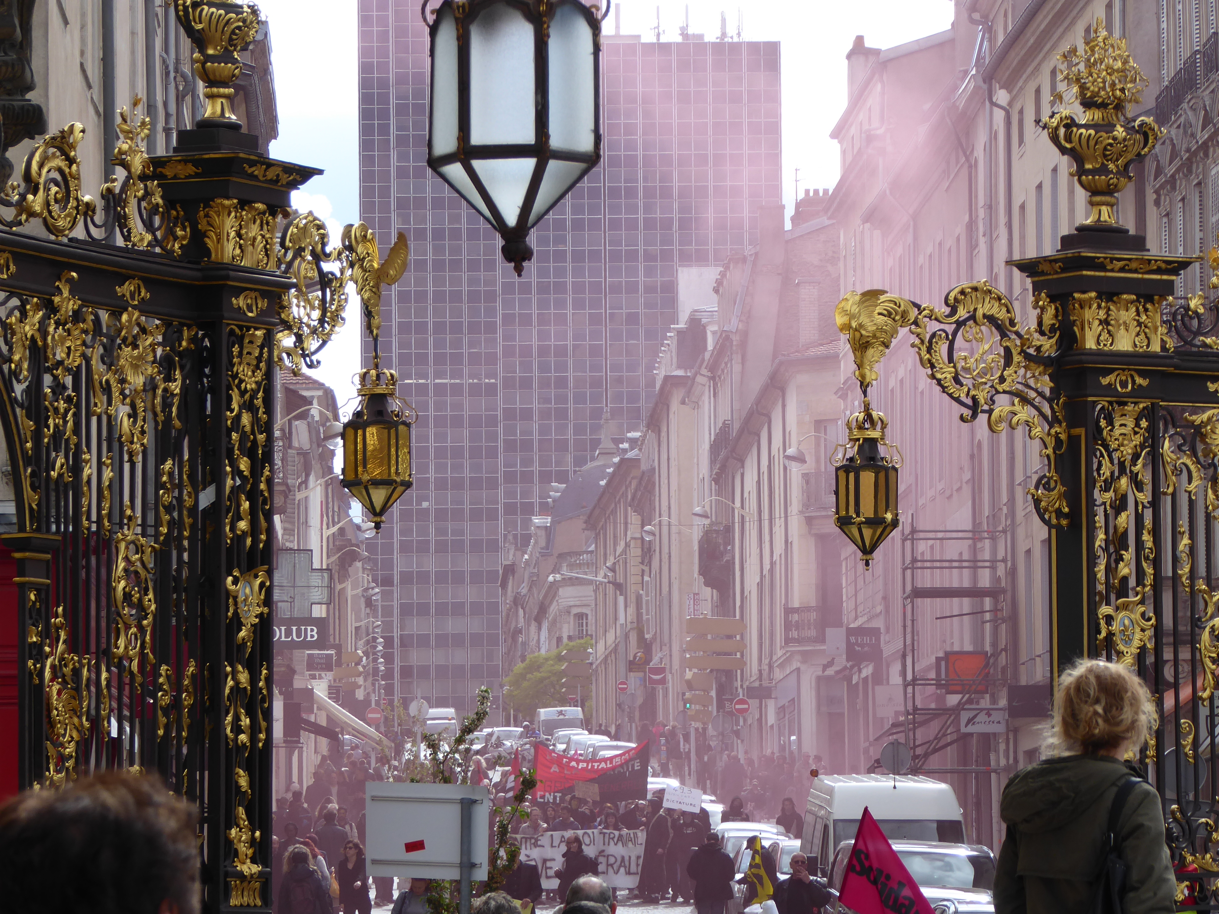 Manifestation du 19 mai 2016 contre la loi travail arrivant place Stanislas à Nancy par la rue Gambetta envahie par la fumée d'un fumigène rouge.